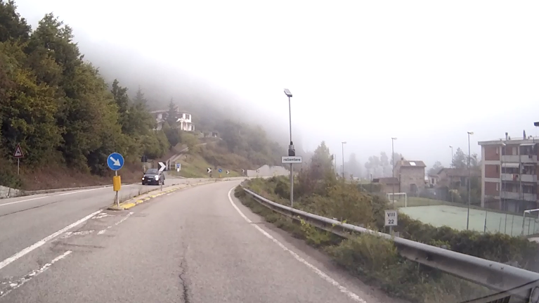 San Piero a Sieve, frazione Campomigliaio